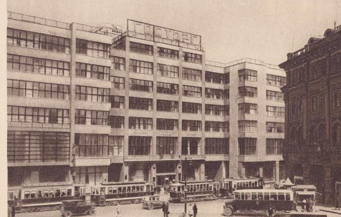 Старинная фотография здания Госторга РСФСР в Москве